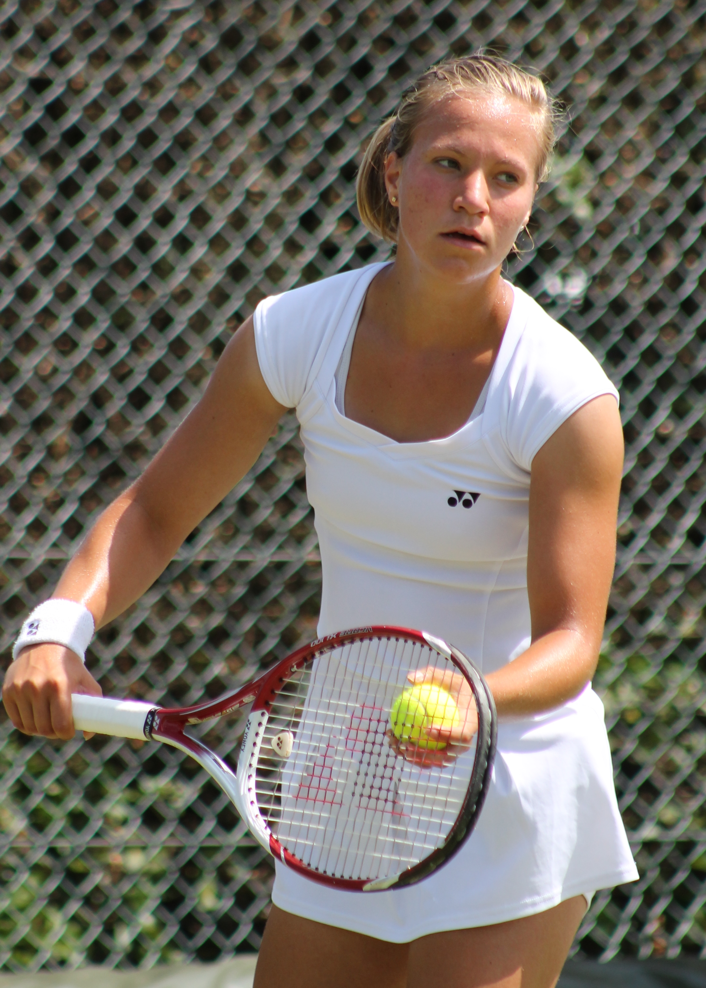 Golubic WMQ14 (6)